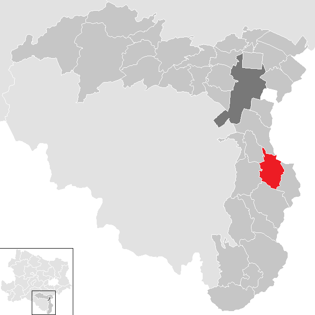 Bezirk Wiener Neustadt-Land